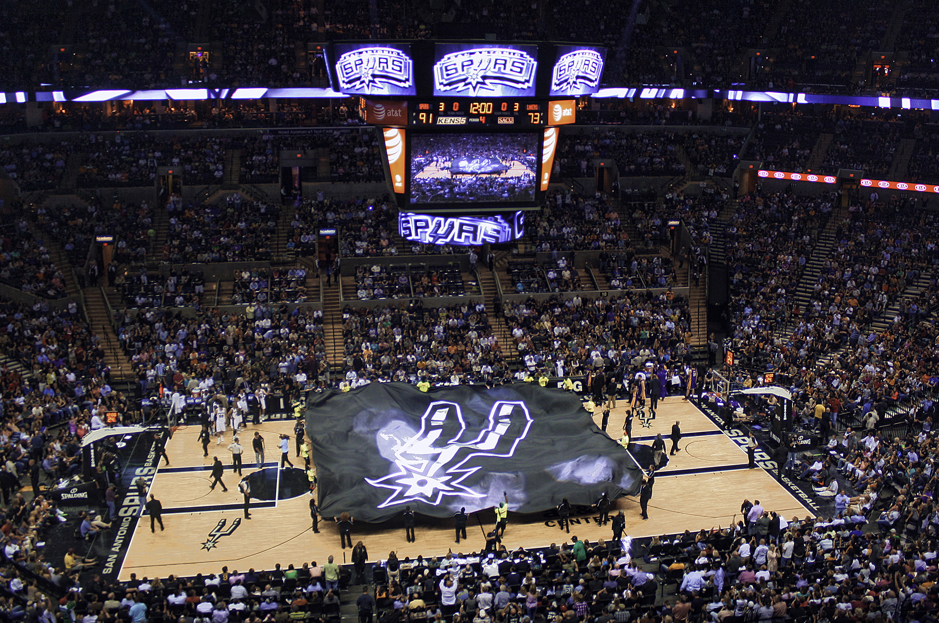 San Antonio, TX